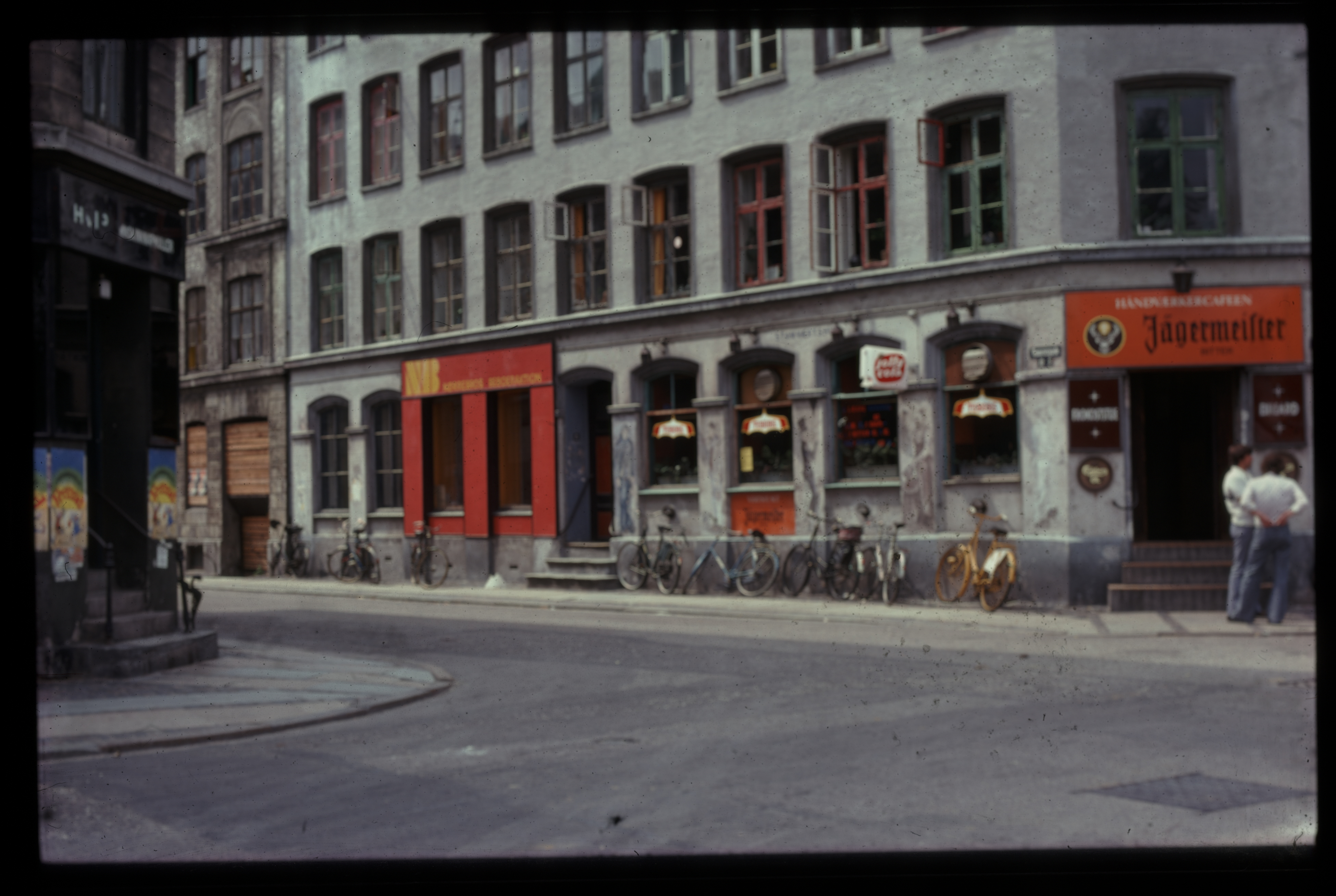 Foto af Tømrergården på hjørnet af Tømrergade og Smedegade, med Nørrebro Beboeraktions kontor i Tømrergade 2